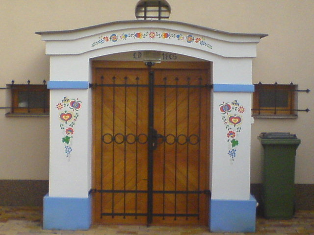 Kyjov - vstup do sklepa